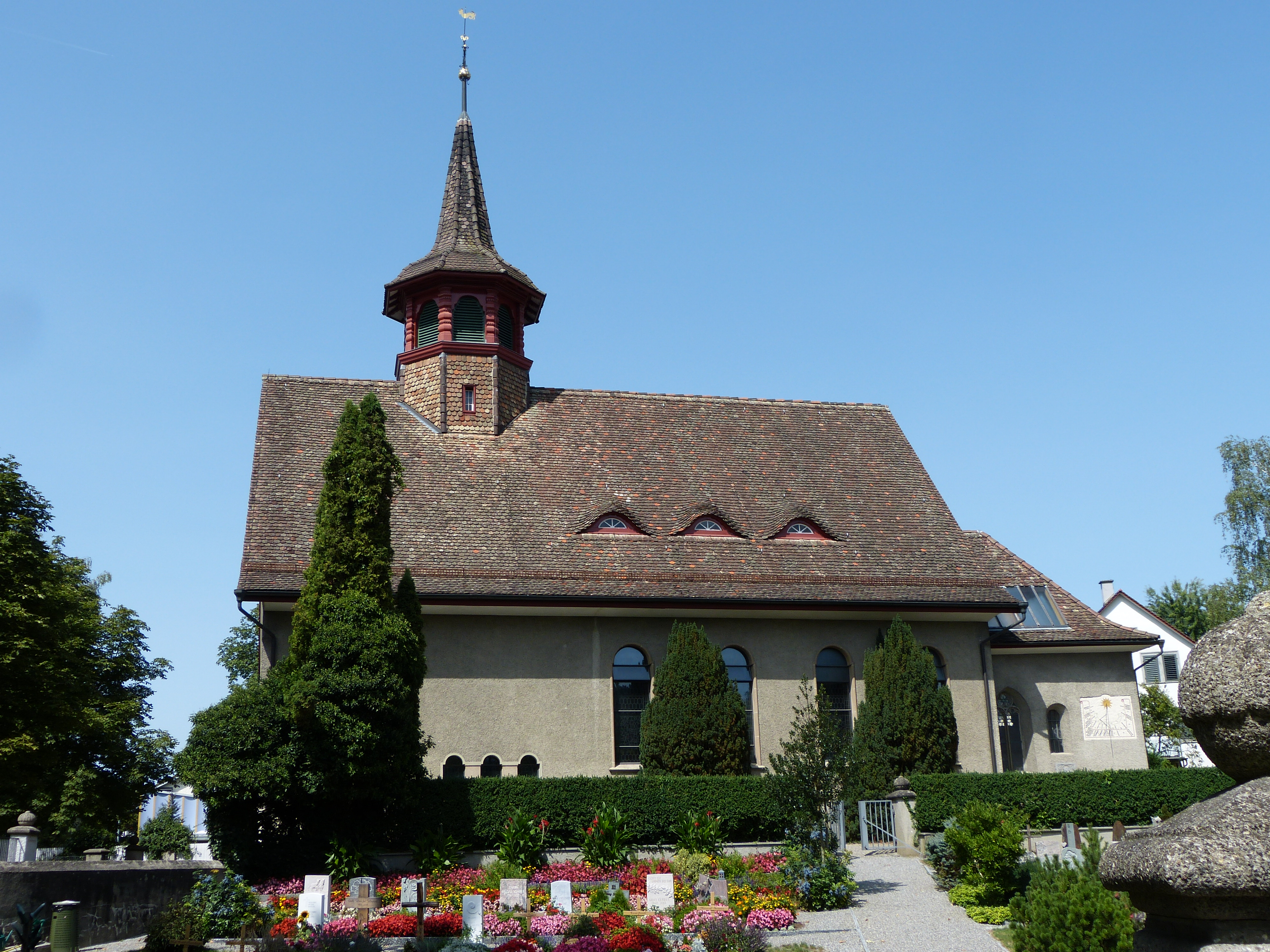 Reformierte Kirche St. Johann